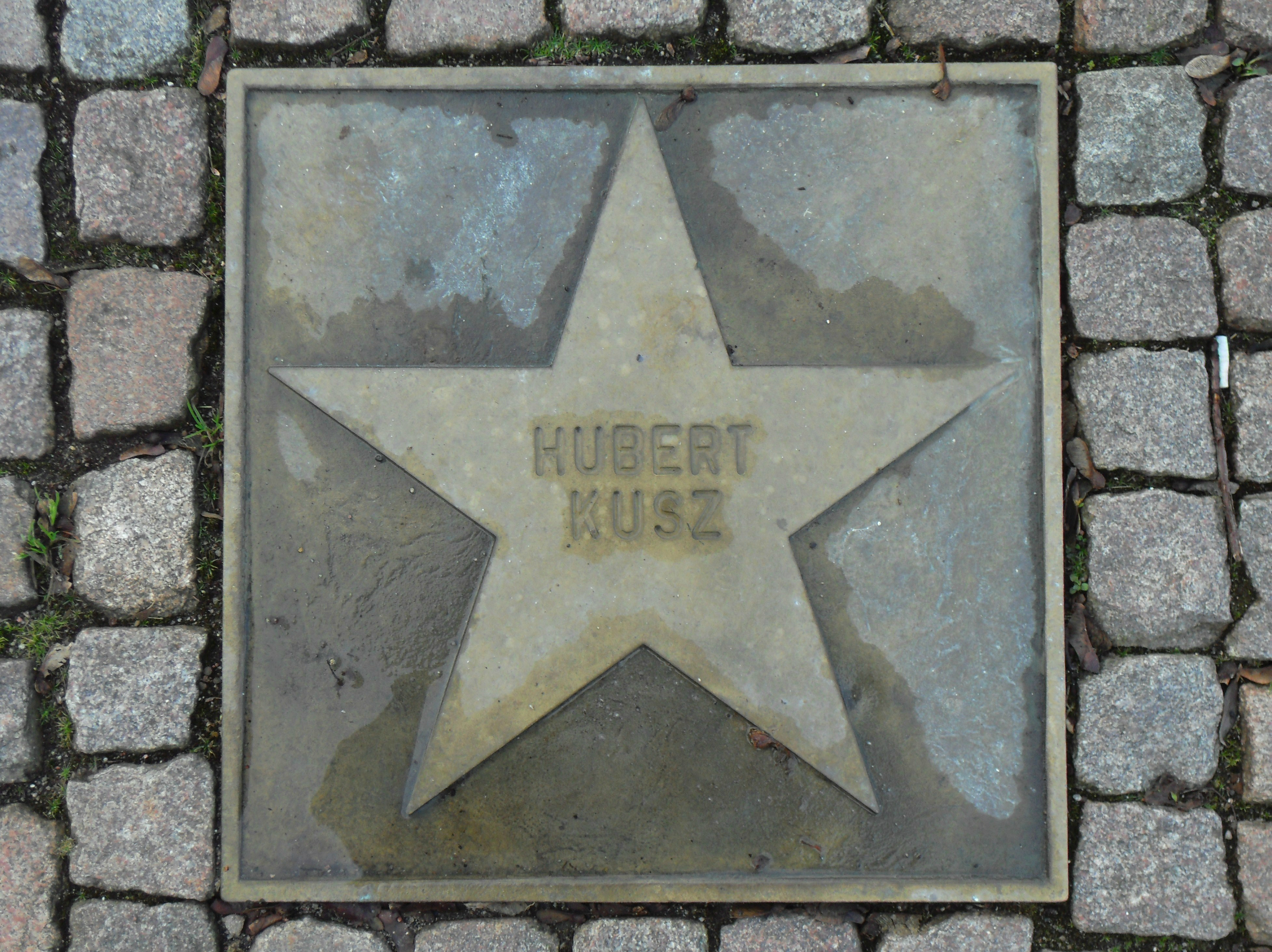 Gwiazda piłkarza Huberta Kusza (1928–2017) w Alei Gwiazd Lechii Gdańsk, korona stadionu przy ul. Traugutta.